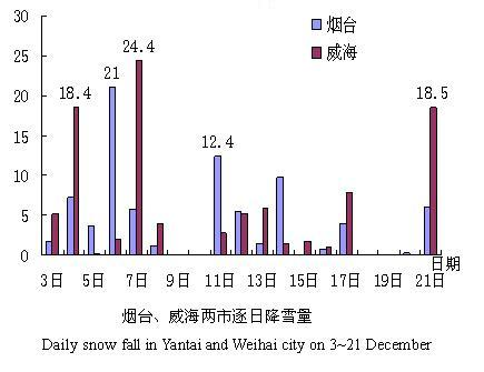 烟台、威海逐日降雪量